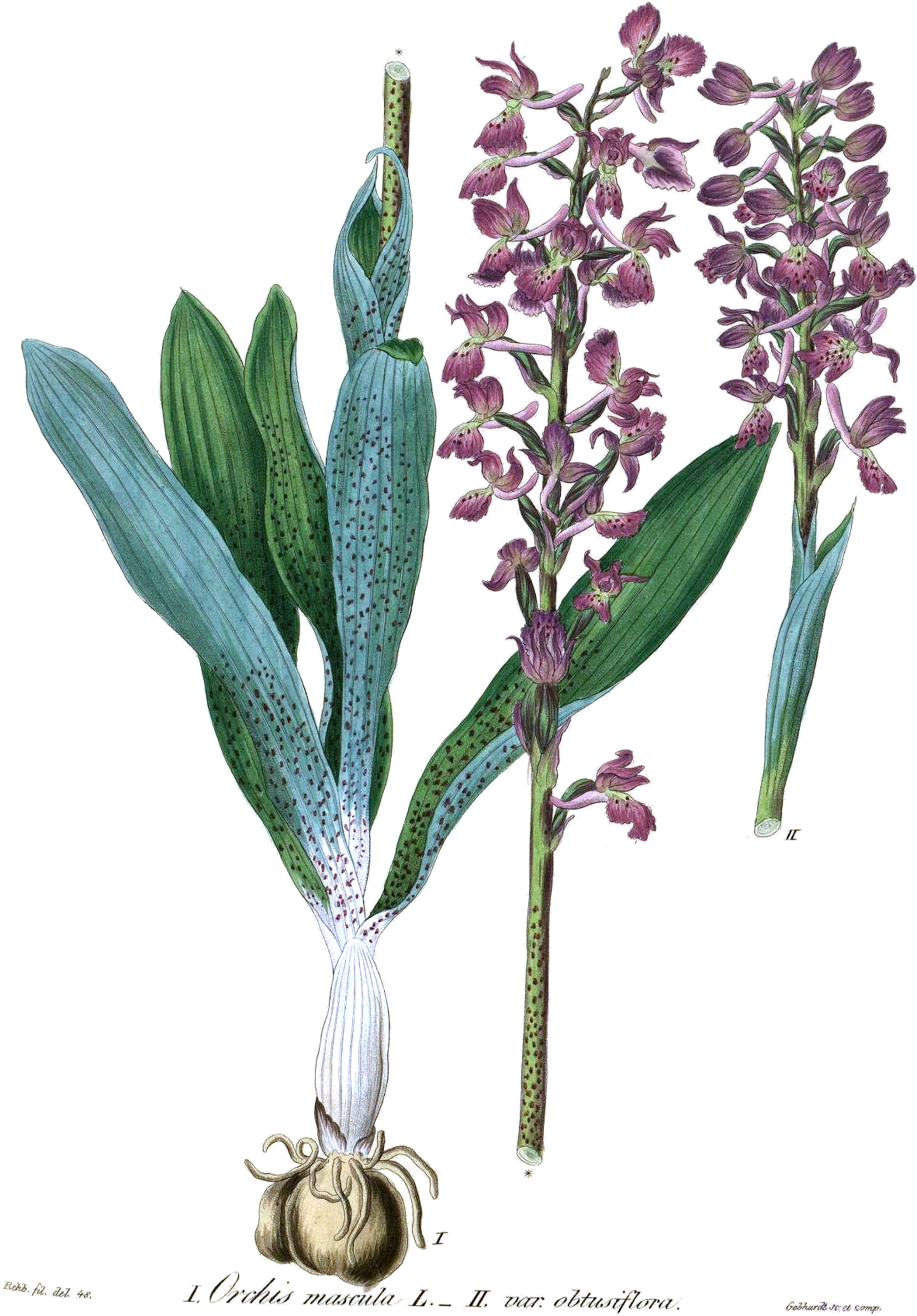 Orchis mascula L.: Icon. nostr. Tab. 39. CCCXC (390).I. Gewöhliche Pflanze. II. var. obtusiflora 1. Dolde vor dem Blühen. + 2. Blütenknospe. + 3. Desgleichen: unterhalb darunter + 4. Desgleichen: Perigon außen geteilt + 5. Desgleichen: etwas darunter + 6. Blüte seitlich nicht verbreitert + 7. Desgleichen: von der Seite, 5 entfernte Perigonblätter + 8. Blüte seitlich, 3 äußere entfernte Blütenblätter. + 9. Blüte ausgebreitet, darunter. + 10. oberes Perigonblatt + 10. Desgleichen: seitlich innen + 12. Desgleichen: seitlich außen. + 13. Labellum expansum. 14. Labellum integrum acutum. 15. Labellum ex alabastro, involutum. + 16. Gynostemium a latere. + 17. Gynostemium antice. + 18. Idem cum calcare. + 19. Idem sine calcare, bursicula remota. + 20. Idem a latere, parte bursiculae et antherae ita excisa, ut conspiciantur retinaculum et glandula. + 21. Gynostemium s. ovarium medio perpendiculariter transsecta. + 22. Anthera ex gemma horizontaliter transsecta. + 23. Pollinarium. + 24. Axis partis pollinarii superioris massulis nonnullis adhaerentibus. + 25. Massula poliinis. 26. Glandula. + 27. Massulae particella. + 28. Frucht. 29. Ovarium transsectum. + 30. 31. Semina. + 31. Flos monstrosus supra descriptus. + 32. Bractea. +